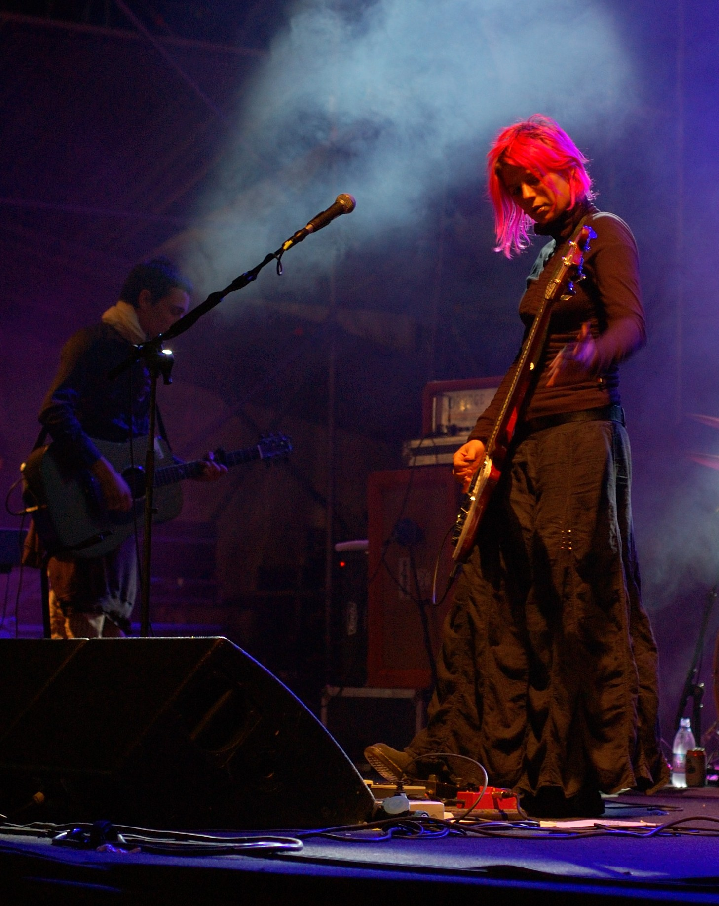 Roberta Sammarelli con i Verdena alla Festa de l' Unità di Modena